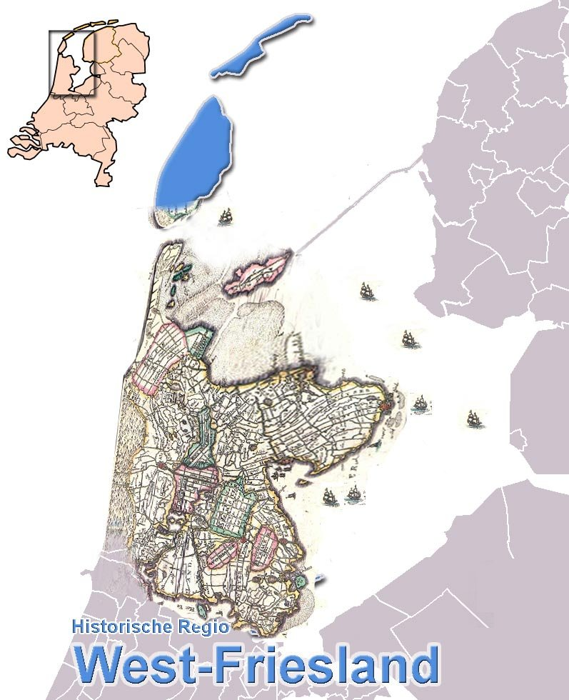 Ed Stevenhagen 6 aug 2005 22:38 (CEST)